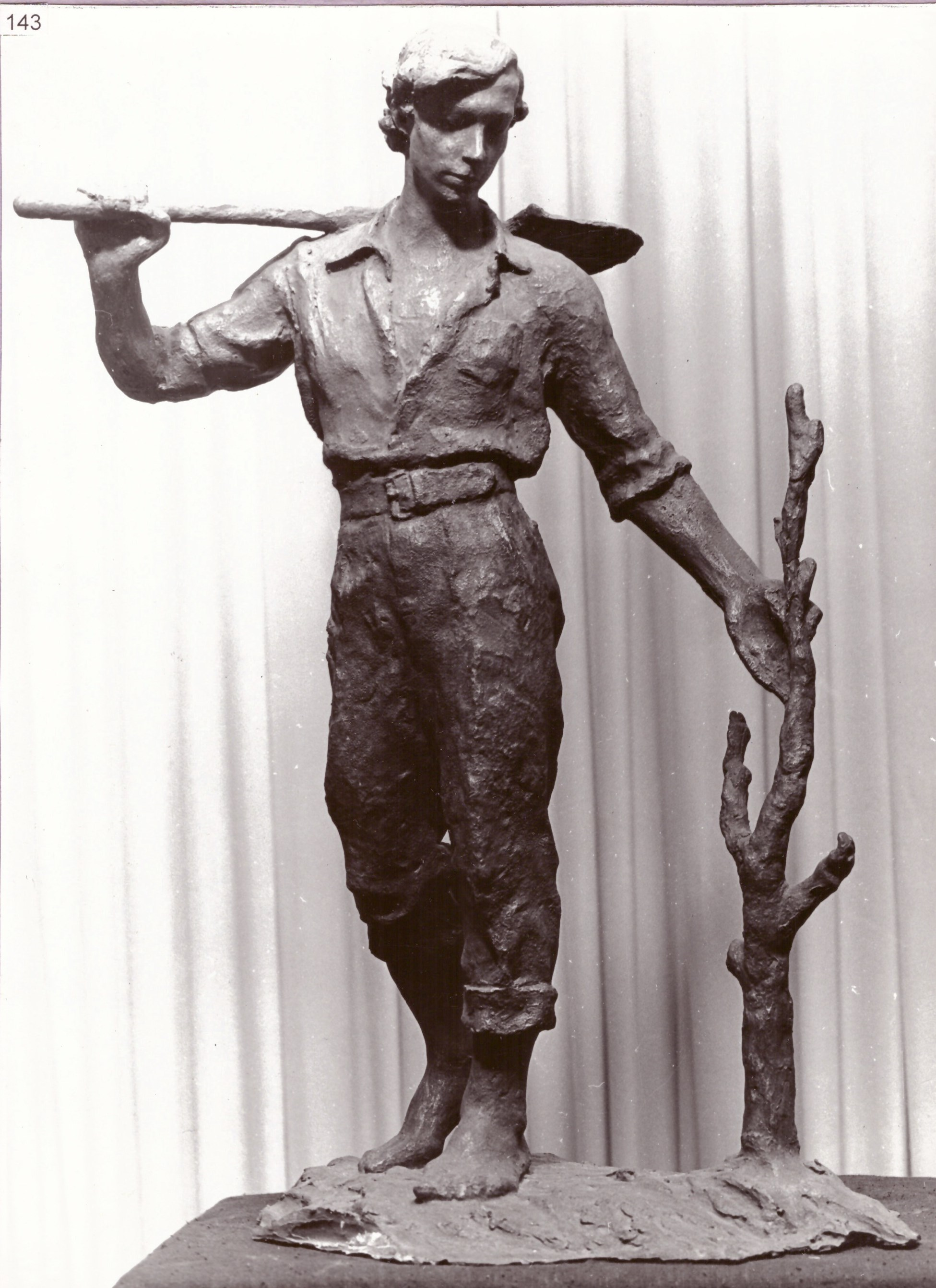 Садівник. 1977. Скульптор Таранченко В.О. Скульптура. Оргскло тоноване. 61 х 40 х 36.